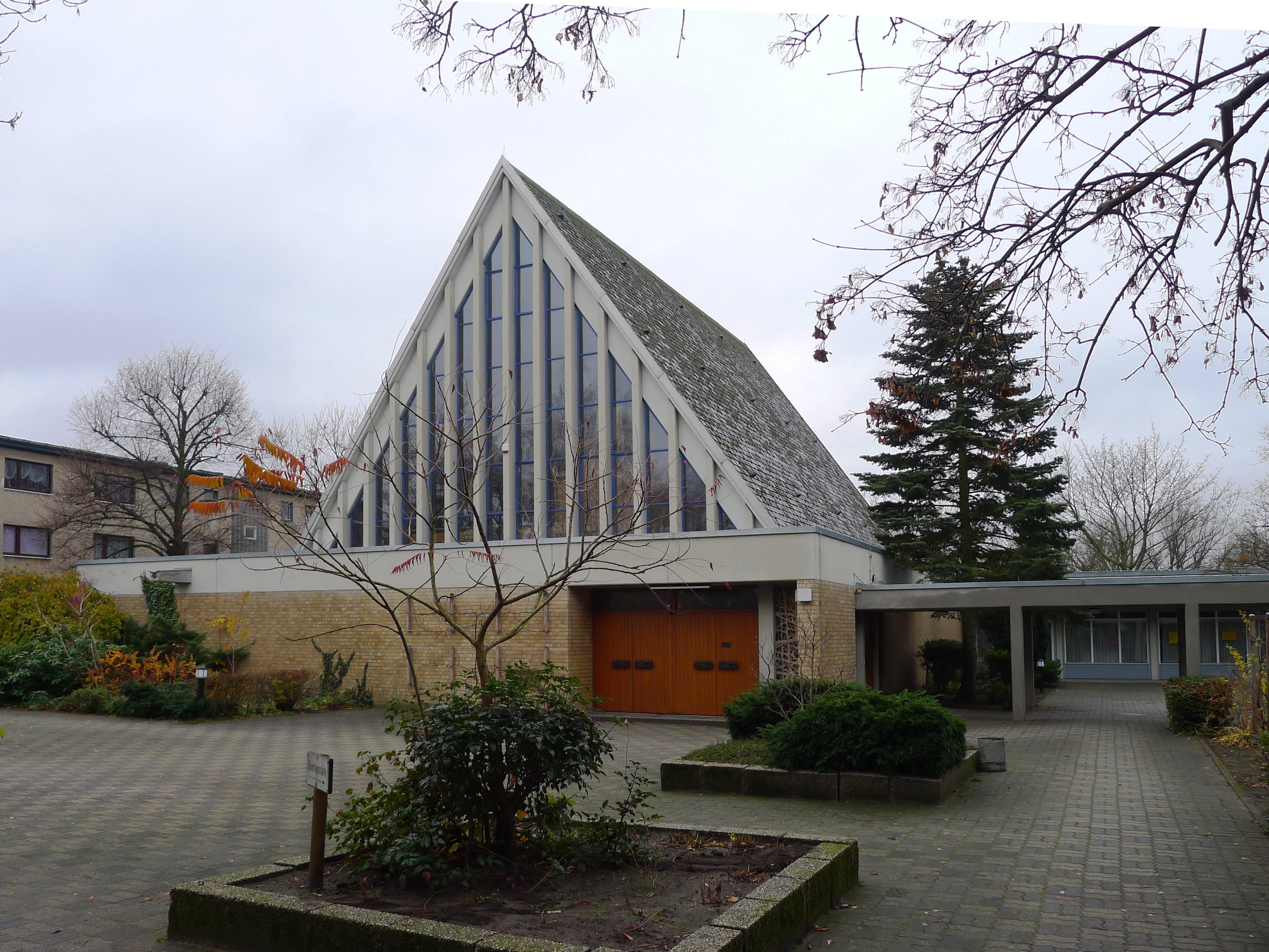 Blick vom Hof auf die Kirche